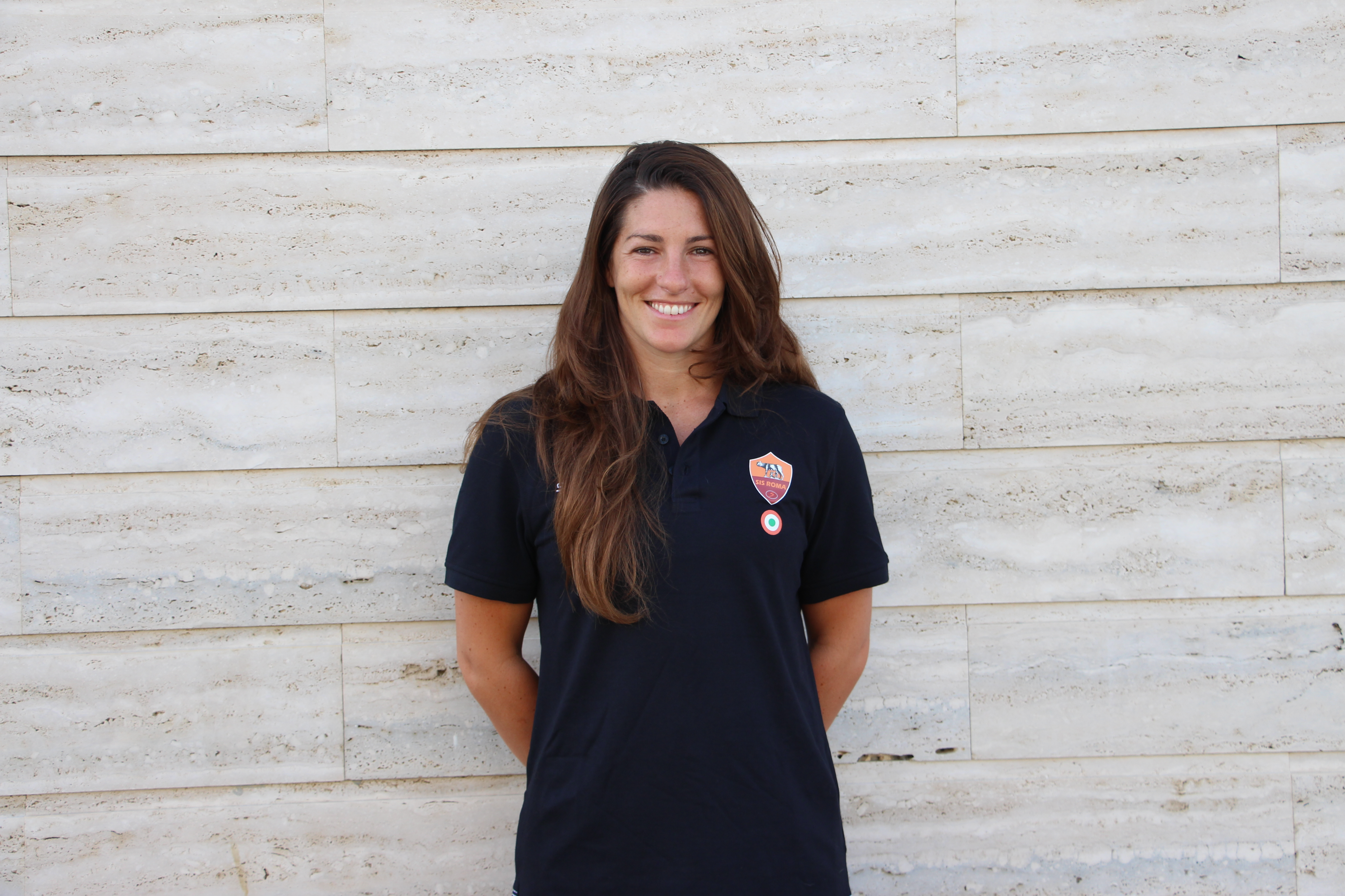 SILVIA MOTTA PALLANUOTISTA SIS ROMA